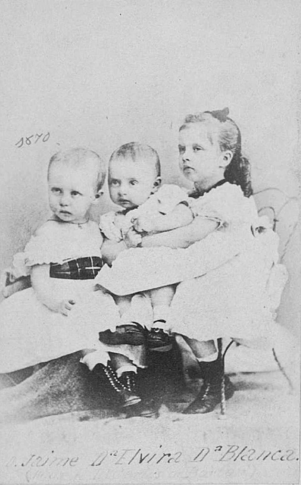 D. Jaime (1870-1931), Dª Elvira (1871-1929) et Dª Blanca (1868-1949).